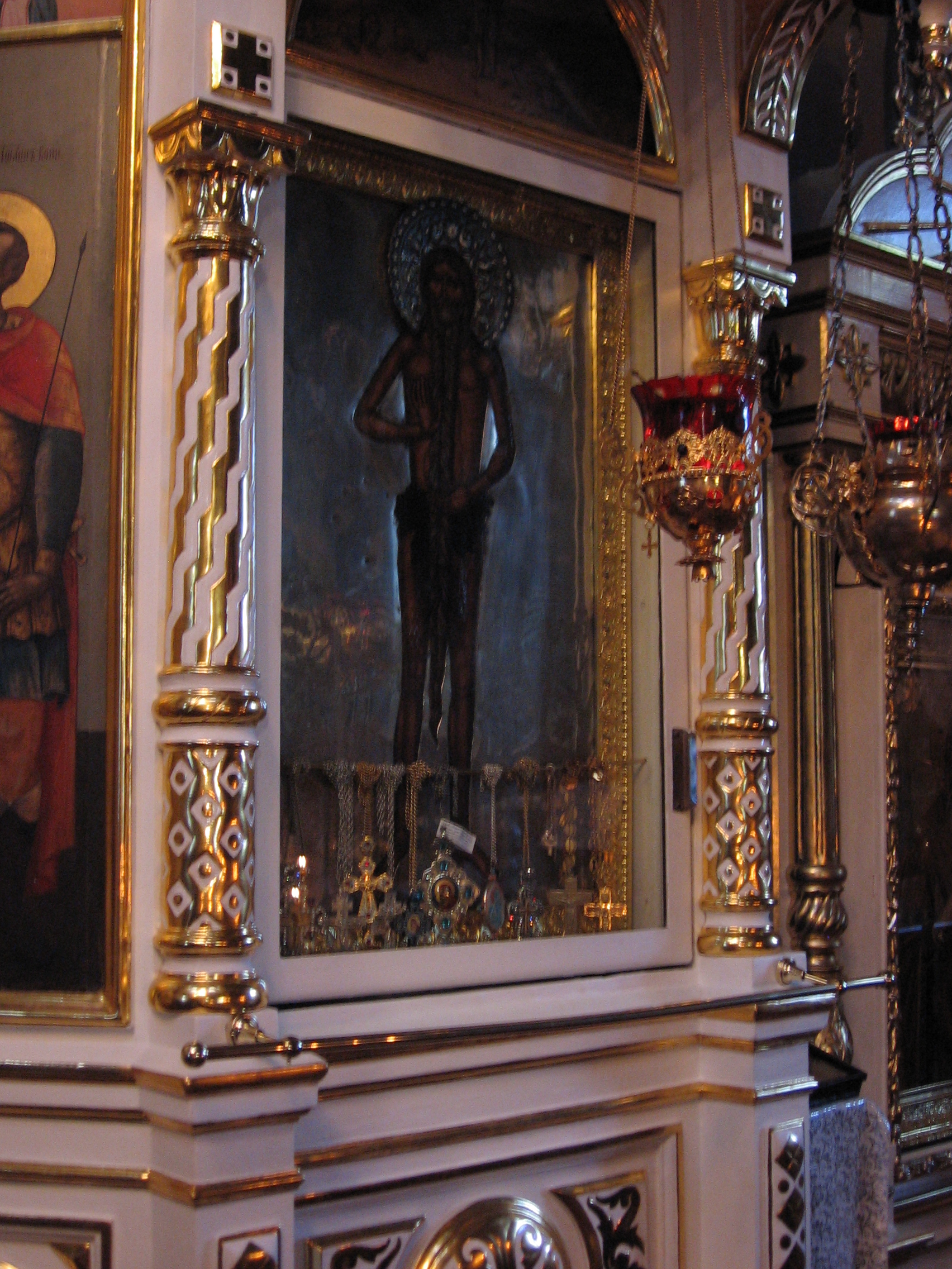 Zespół klasztoru prawosławnego (Jabłeczna) 03.1966.